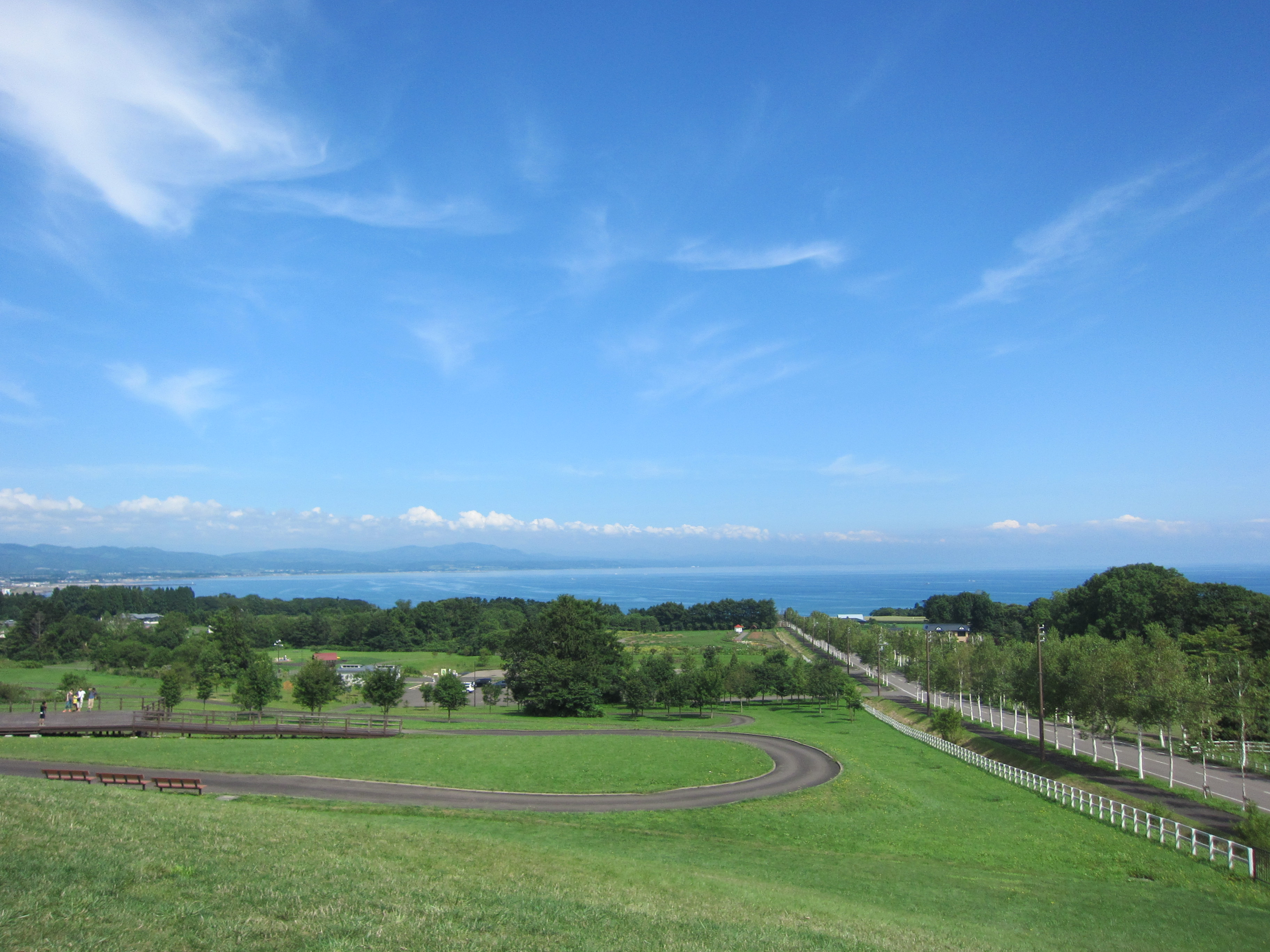 道央自動車道八雲パーキングエリア（噴火湾パノラマパーク）から八雲町市街地を望む